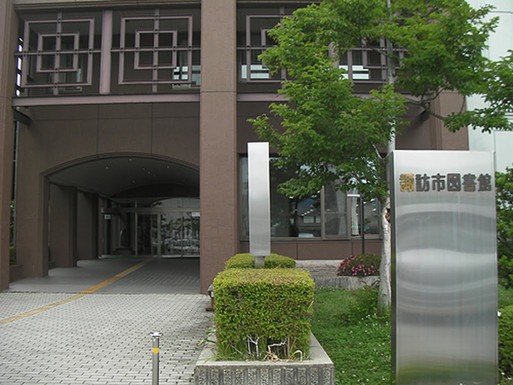 長野県の諏訪市図書館。